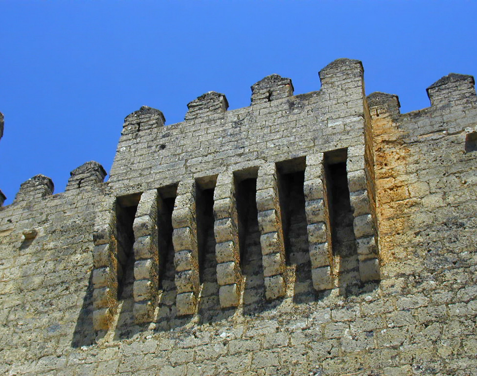 Montealegre de Campos, Valladolid, España. Castillo.